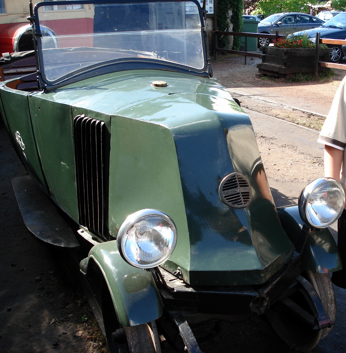 Abreschviller, comm. du dép. de la Moselle, France (région Lorraine). Train touristique (ancien chemin de fer forestier): draisine Renault de 1925.